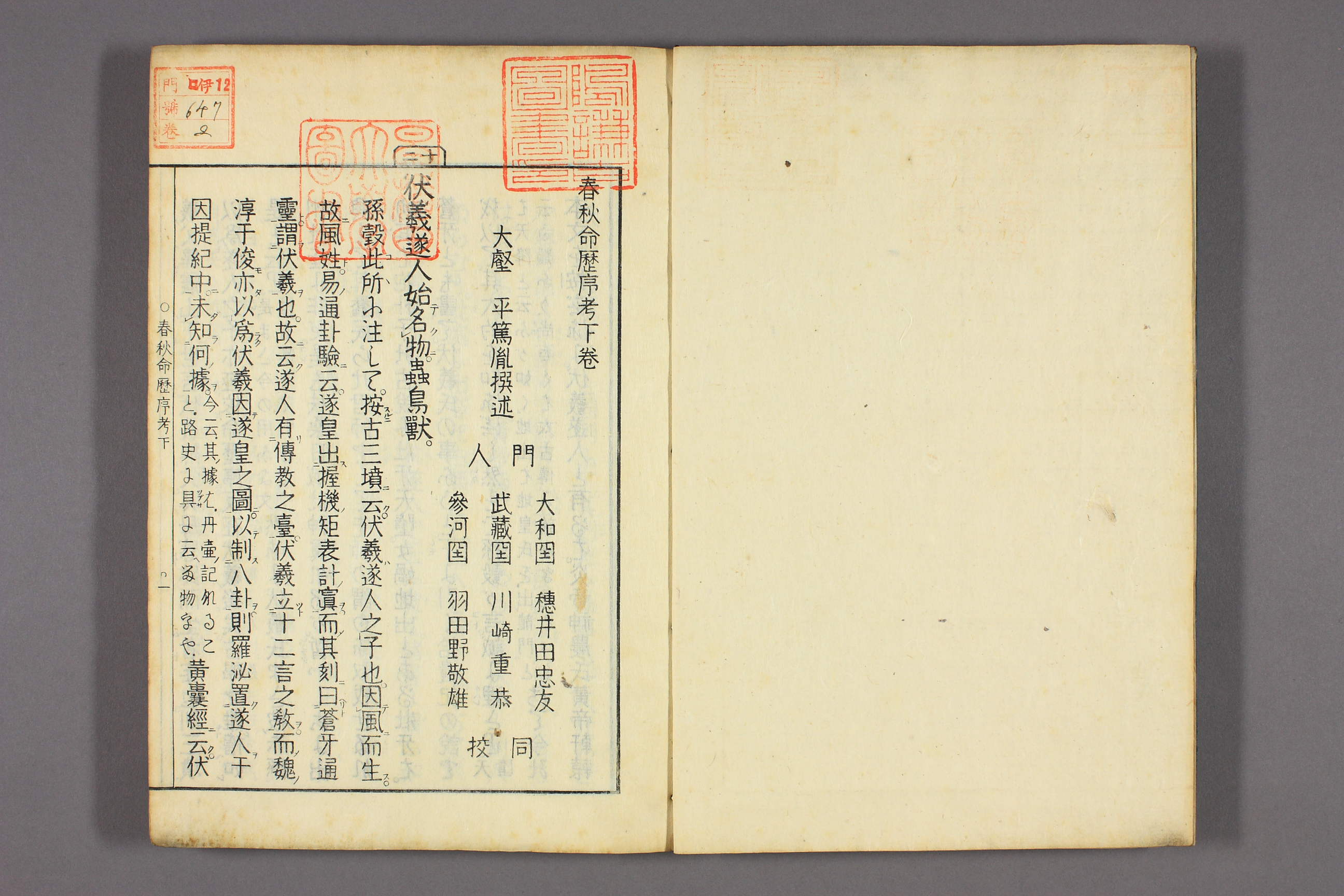 平田篤胤著『春秋命歴序考』下（早稲田大学図書館蔵）